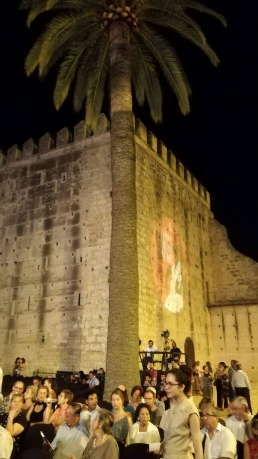 proyección de logotipo de 50 edición de la Fiesta de la Bulería en la torre del homenaje del Alcázar de Jerez